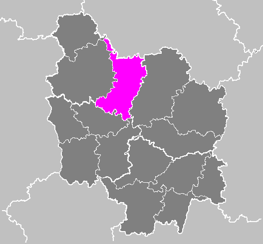 Maps of arrondissements and cantons of France: Arrondissement d Avallon.PNG (Région Bourgogne)